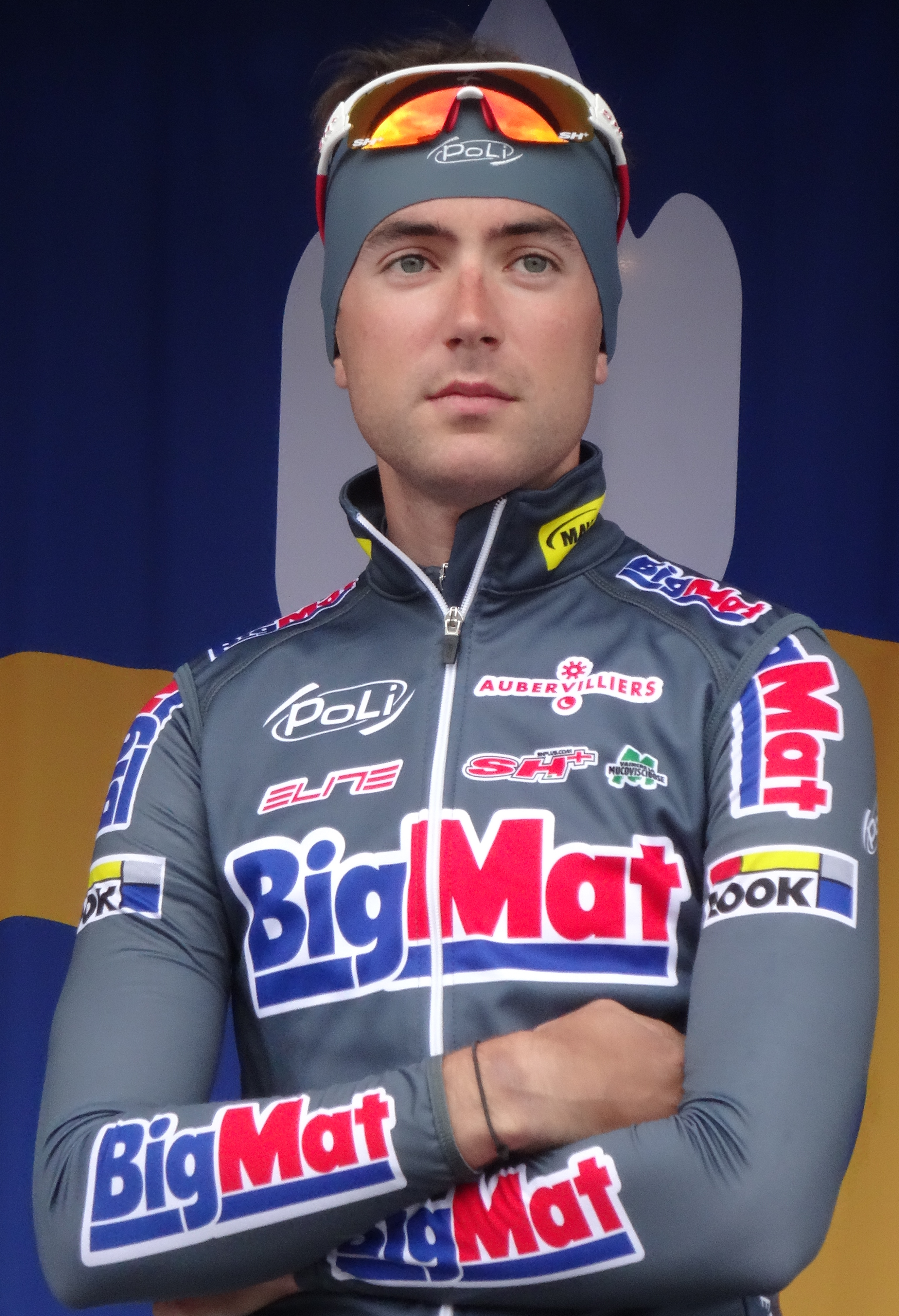 Reportage photographique réalisé le jeudi 8 mai 2014 au départ de la deuxième étape de l'édition 2014 des Quatre jours de Dunkerque à Hazebrouck, Nord, Nord-Pas-de-Calais, France. Depicted person: Flavien Dassonville Depicted team: BigMat-Auber 93